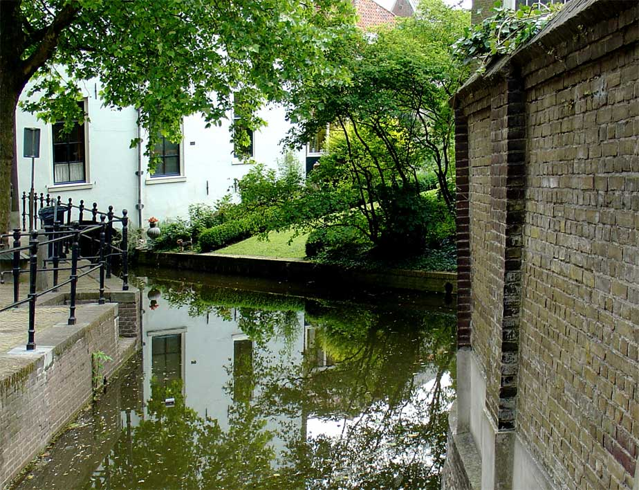 Achter de Kerk (St. Janskerk) te Gouda. KOSTERHUIS. Statige lijstgevel (XIX A) met Empire-schuiframen. Huis met omlopend schilddak